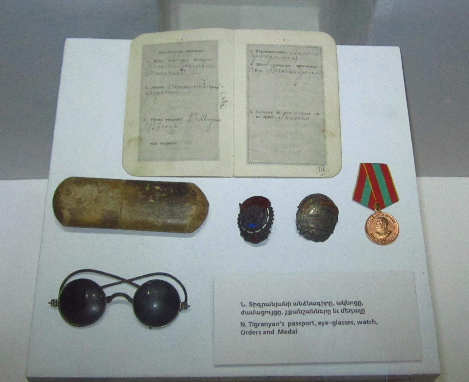 Личные вещи и награды композитора Никогайоса Тиграняна. Музей литературы и искусства имени Егише Чаренца. Ереван.